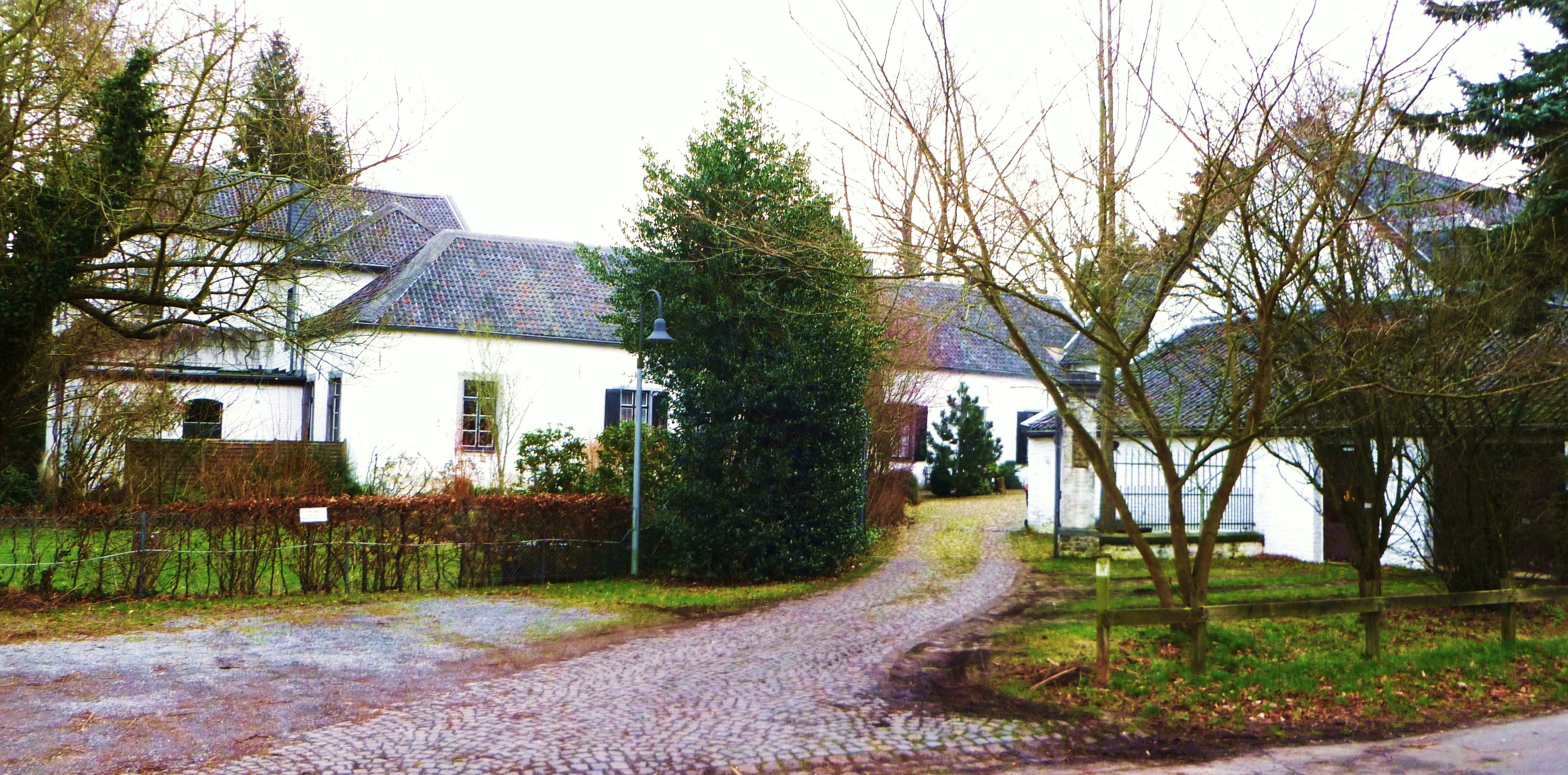 Baudenkmal in Aache-Mitte; Geburtshaus von Alfred Rethel; Landgut, Mühlenbetrieb; Fabrikstätte für Salmiak und Berliner Blau; Erstbau um 161; Neubau um 1820